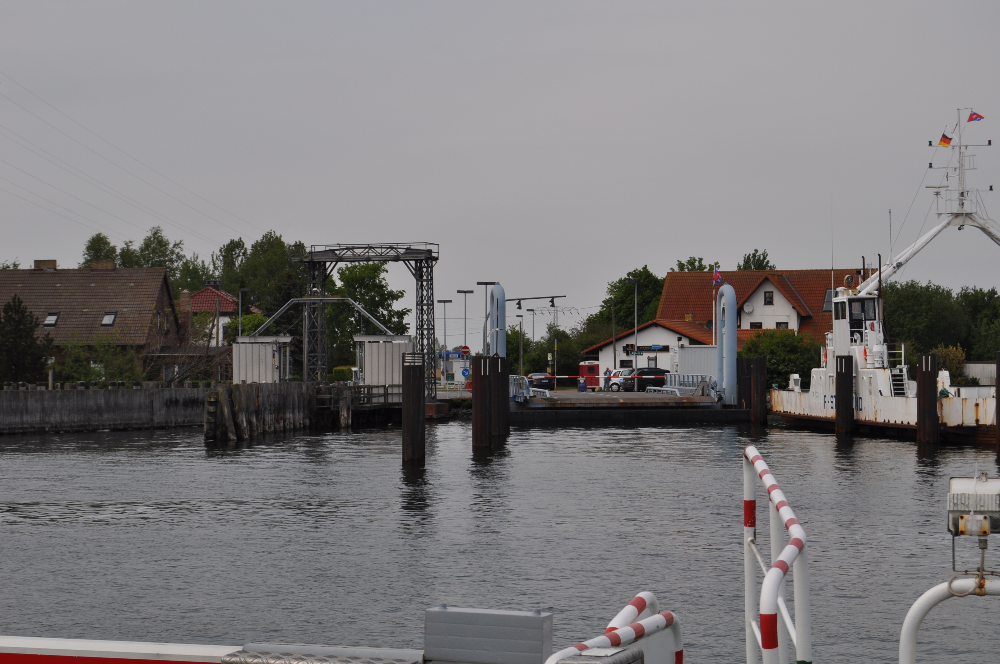 Wittower Fähre - links alter Anleger (Denkmal), Mitte neuer Anleger, rechts Fähre Stralsund